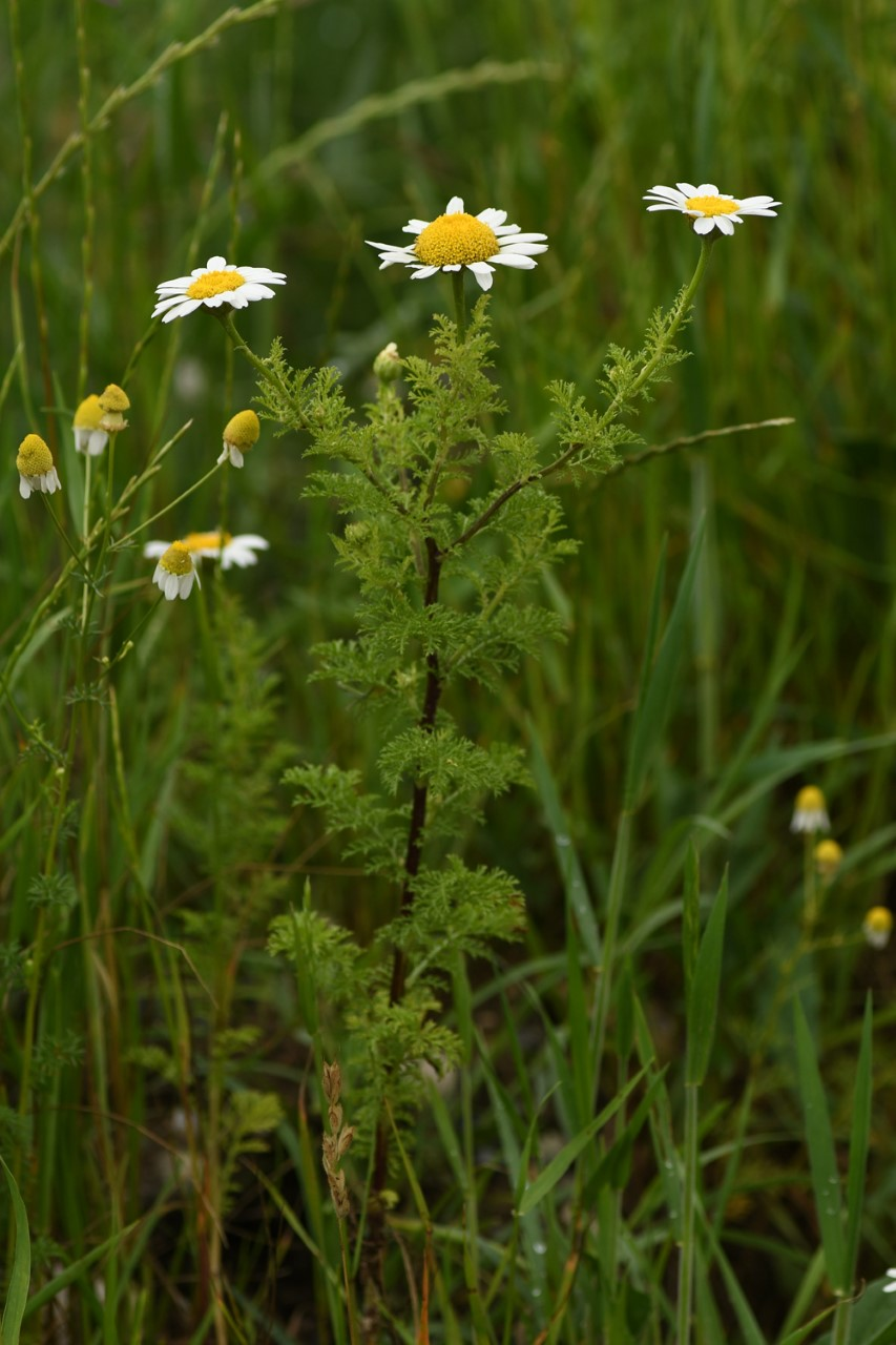 Ώριμο άτομο Cota altissima